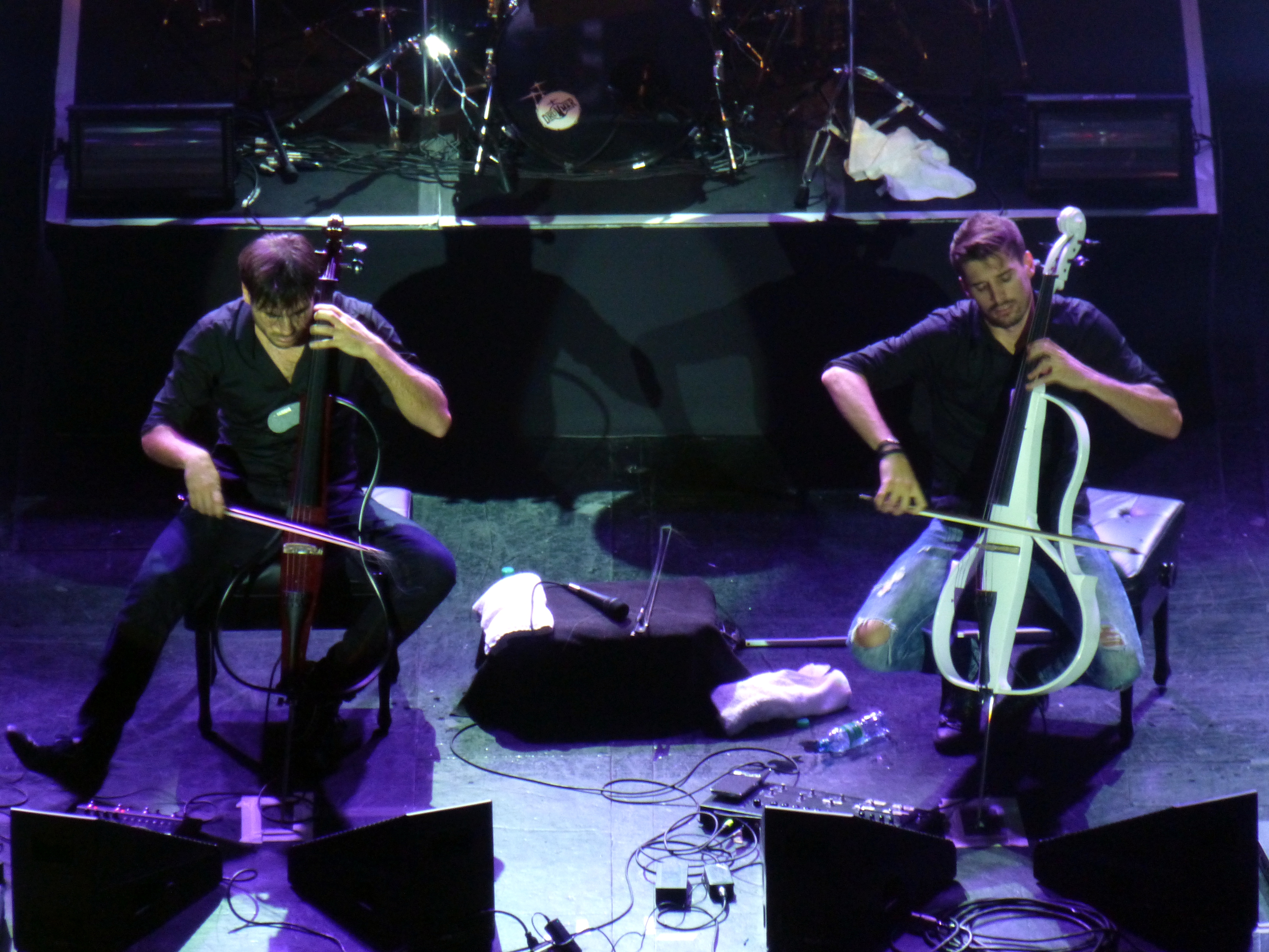 El dúo esloveno-croata 2CELLOS en su presentación en el Teatro Gran Rex de la ciudad de Buenos Aires, Argentina.